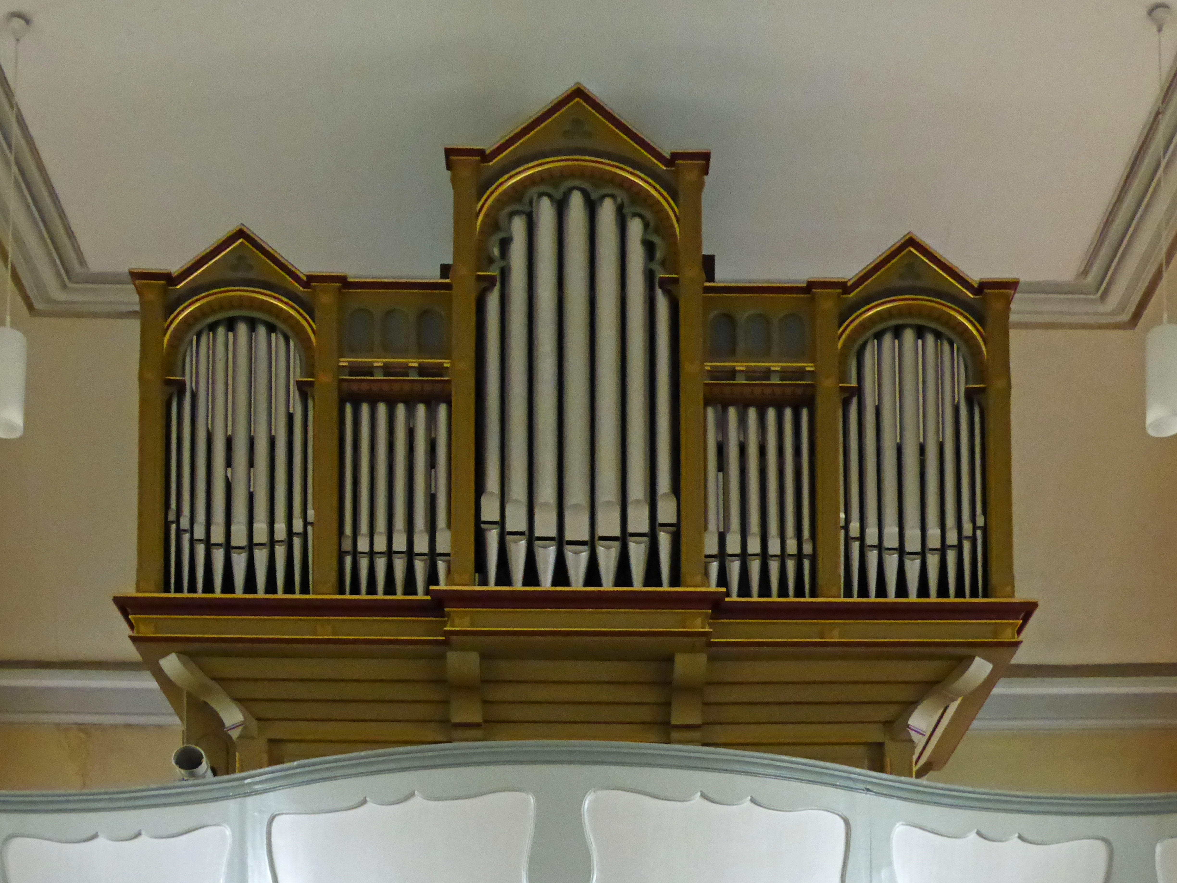 Orgel in der St.-Georg-Kirche in Adlum